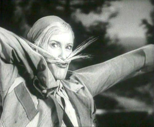 Кадр из фильма «Волга-Волга» (1938)Кадр из фильма «Волга-Волга». Любовь Орлова.